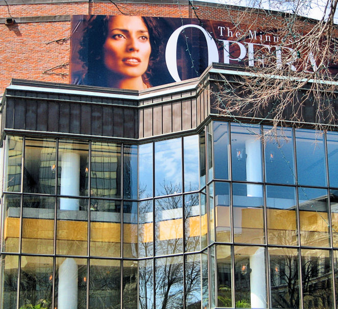 St. Paul, Minnesota